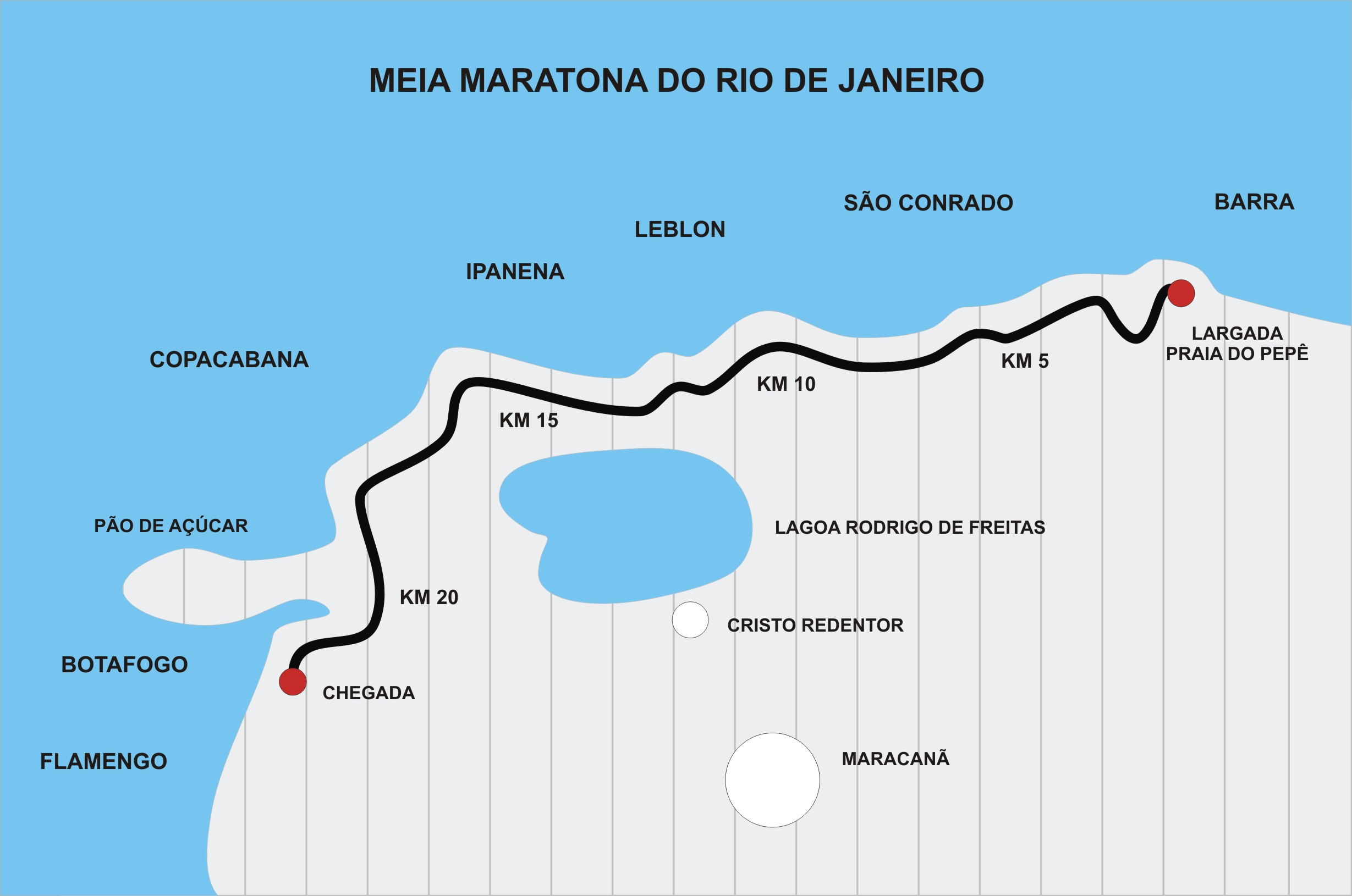 Reprodução do mapa com trajeto da Meia Maratona do Rio.